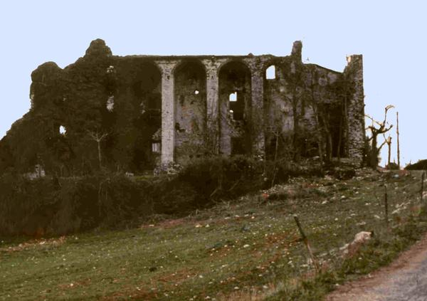 parte posteriore del castello "vecchio" di Colleferro